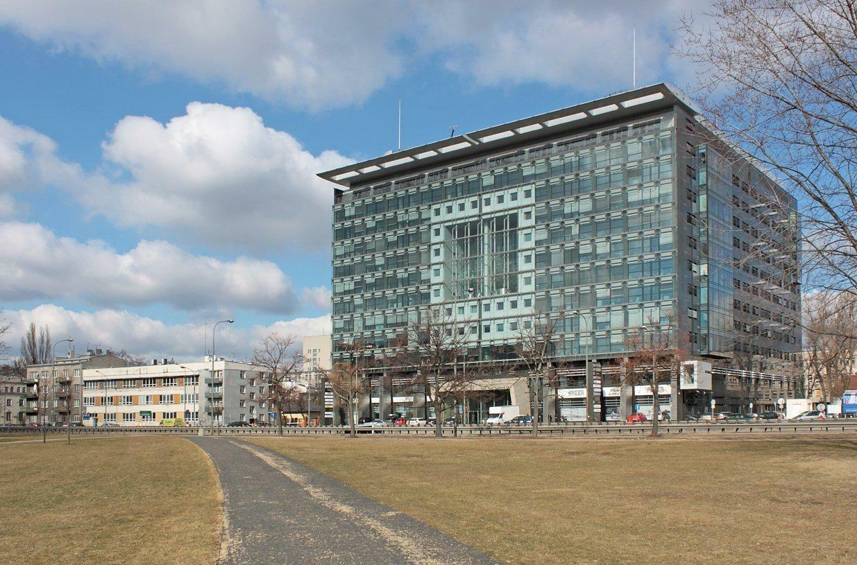 Widok z Pola Mokotowskiego, z części nazwanej im. Józefa Piłsudskiego, na Focus Filtrowa, którego architektura, a szczególnie elewacja frontowa, nasuwa mi skojarzenia z procesorem komputerowym. Po lewej blok przy al. Armii Ludowej 28.